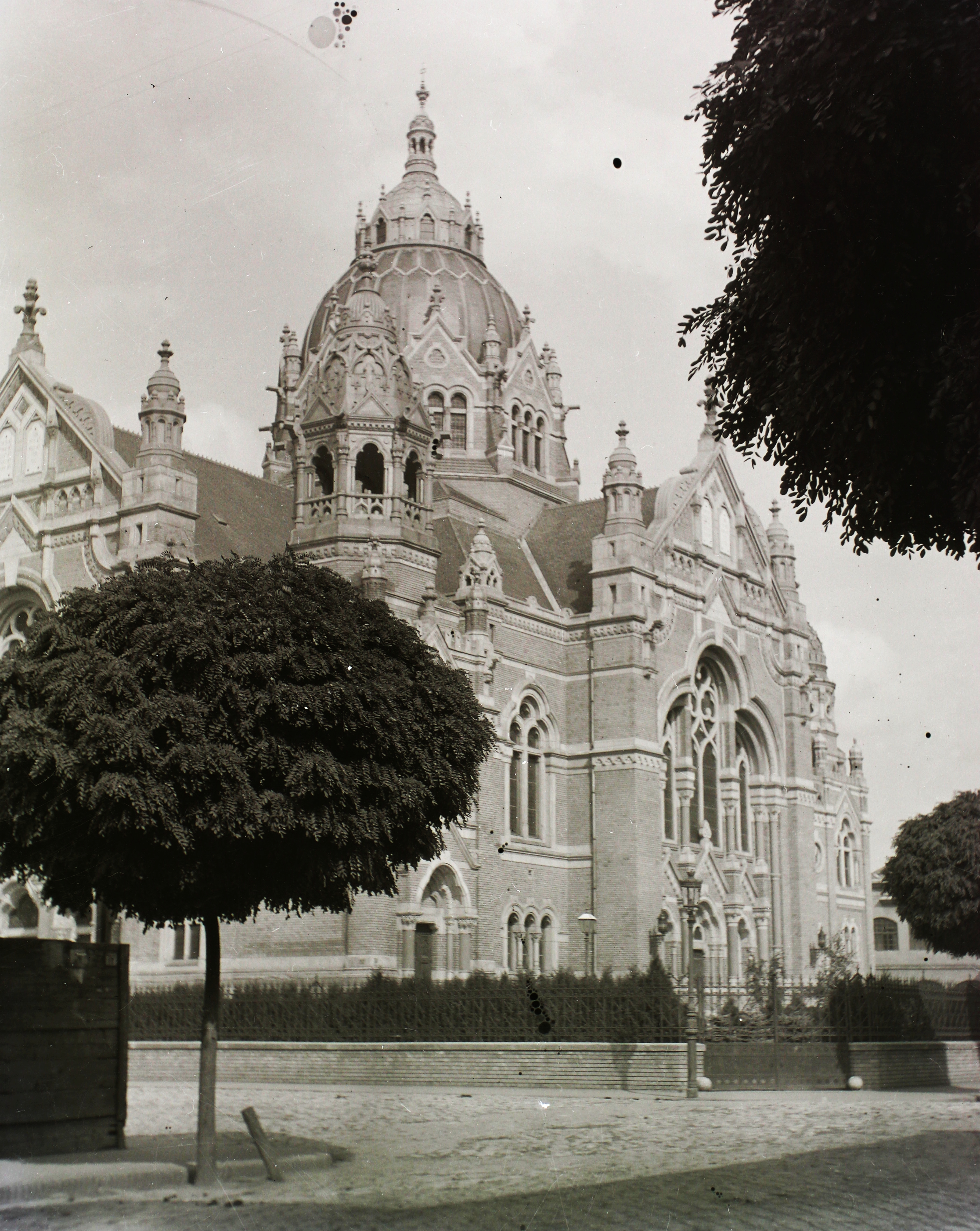 Új zsinagóga, a Jósika utca - Gutenberg utca sarokról nézve. Location: Hungary, Szeged Tags: synagogue Title: Új zsinagóga, a Jósika utca - Gutenberg utca sarokról nézve.